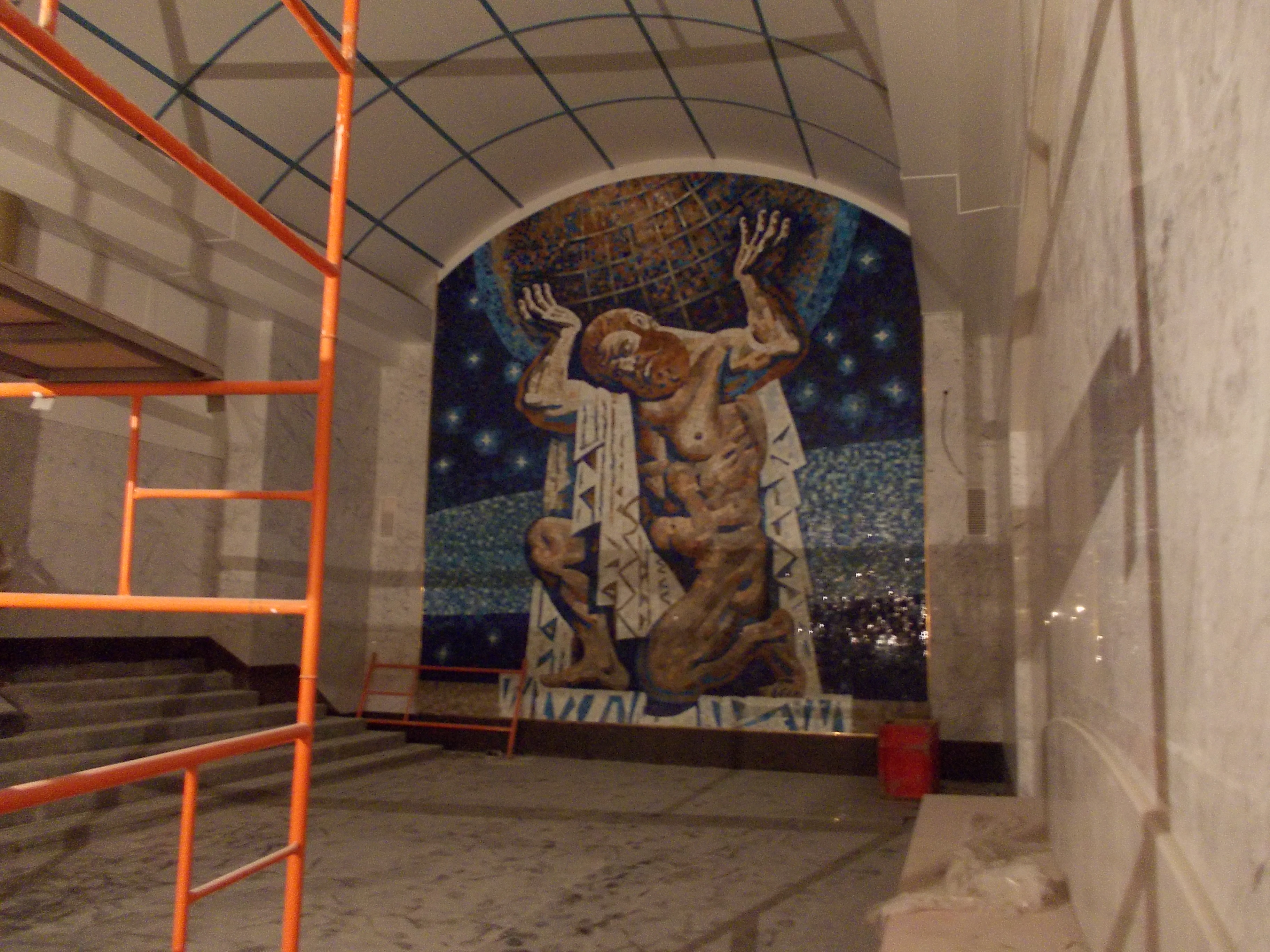 Панно станции метро Международная во время строительства.